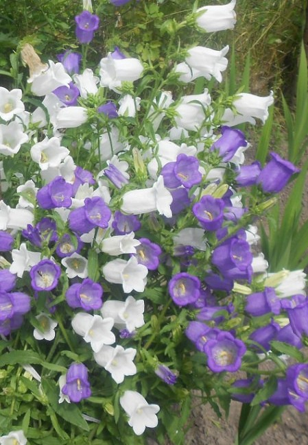 Дзвоники середні, вирощені в с. Лісівщина Коростенського району Житомирської обл.